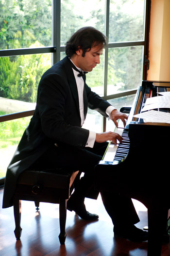 Manolo Carrasco Pianista, Compositor y Director Musical